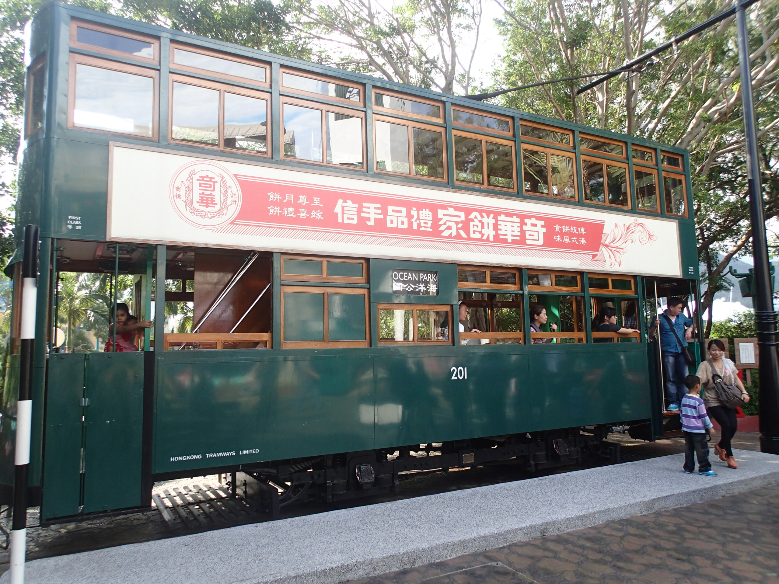 Ocean Park, Hong Kong